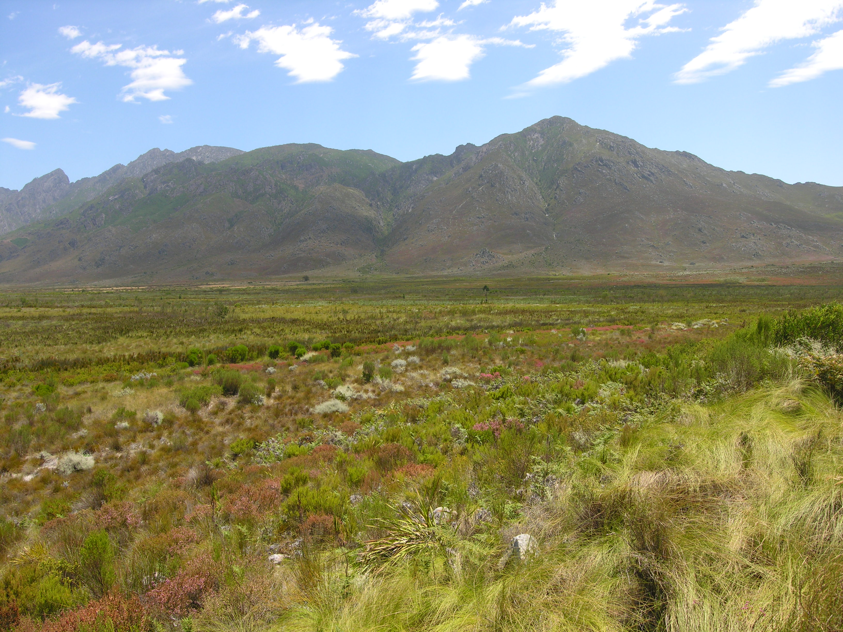 Fynbos near Franschhoek